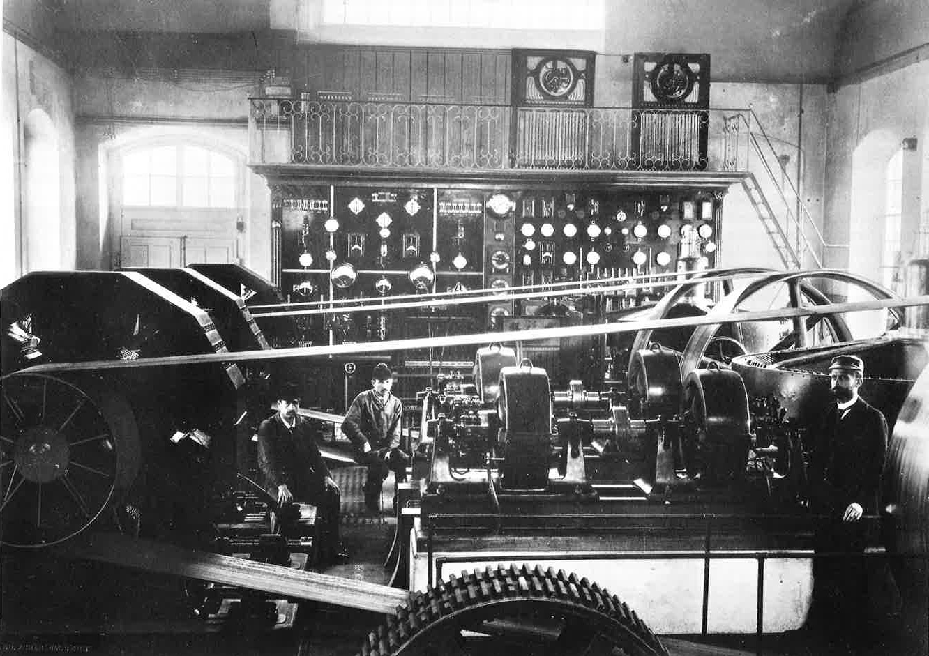 Das erste Elektrizitätswerk in der Stadt Bern, im Mattequartier. Aufnahme von 1891. Rechts sind die Jonval-Turbinen zu sehen, die über Balata-Riemen die Gleichstromgeneratoren antreiben. Es waren drei Generatoren von MFO aufgestellt, wovon abe nur zwei in Betrieb waren, der dritte war Reserve. Die Generatoren erzeugten 120 V Gleichstrom.